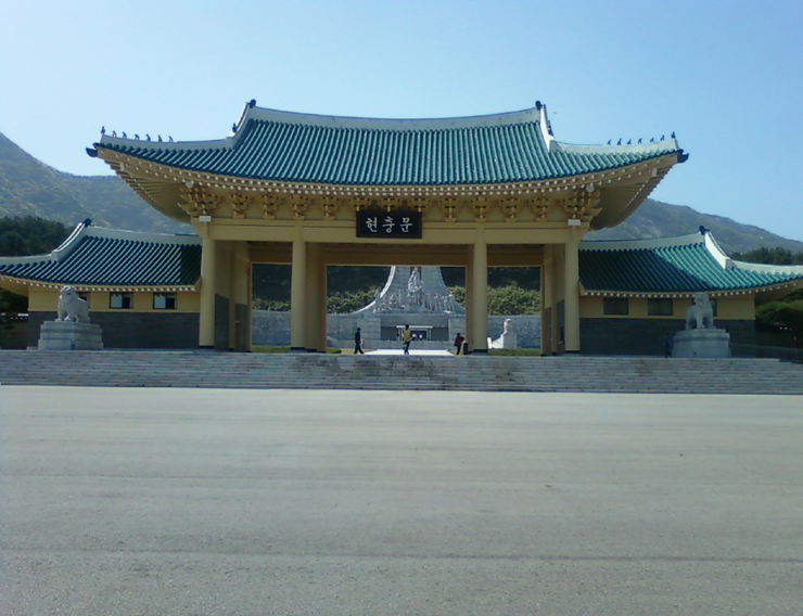 국립대전현충원의 현충문